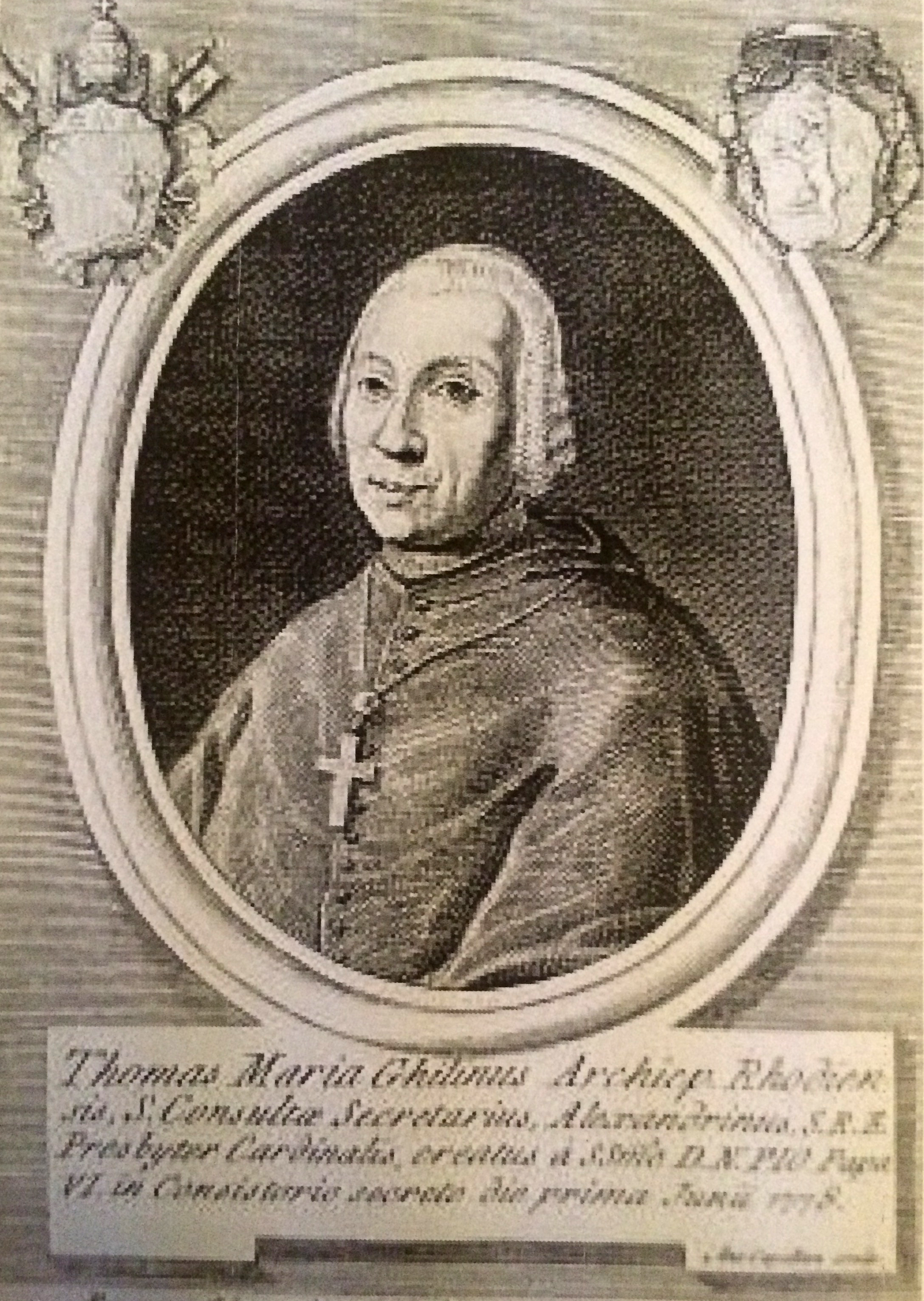 Foto di una stampa raffigurante il cardinale Tommaso Maria Ghilini (1718-1787)